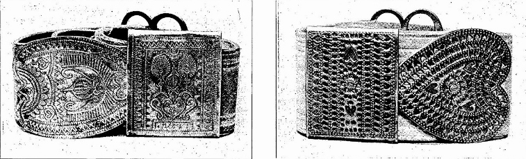 Boucles de ceinture en cuivre ciselé servant à fermer la ceinture de cuir portée traditionnellement au XIXe siècle par les hommes de la région de Plogonnec, Quéménéven et Kerlaz pour soutenir leurs braies [pantalon] en toiles de chanvre.